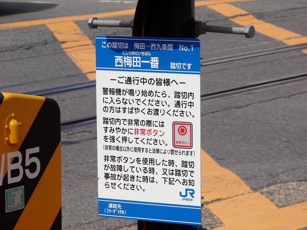 JR西日本の踏切に設置されている踏切用非常ボタンの注意書き